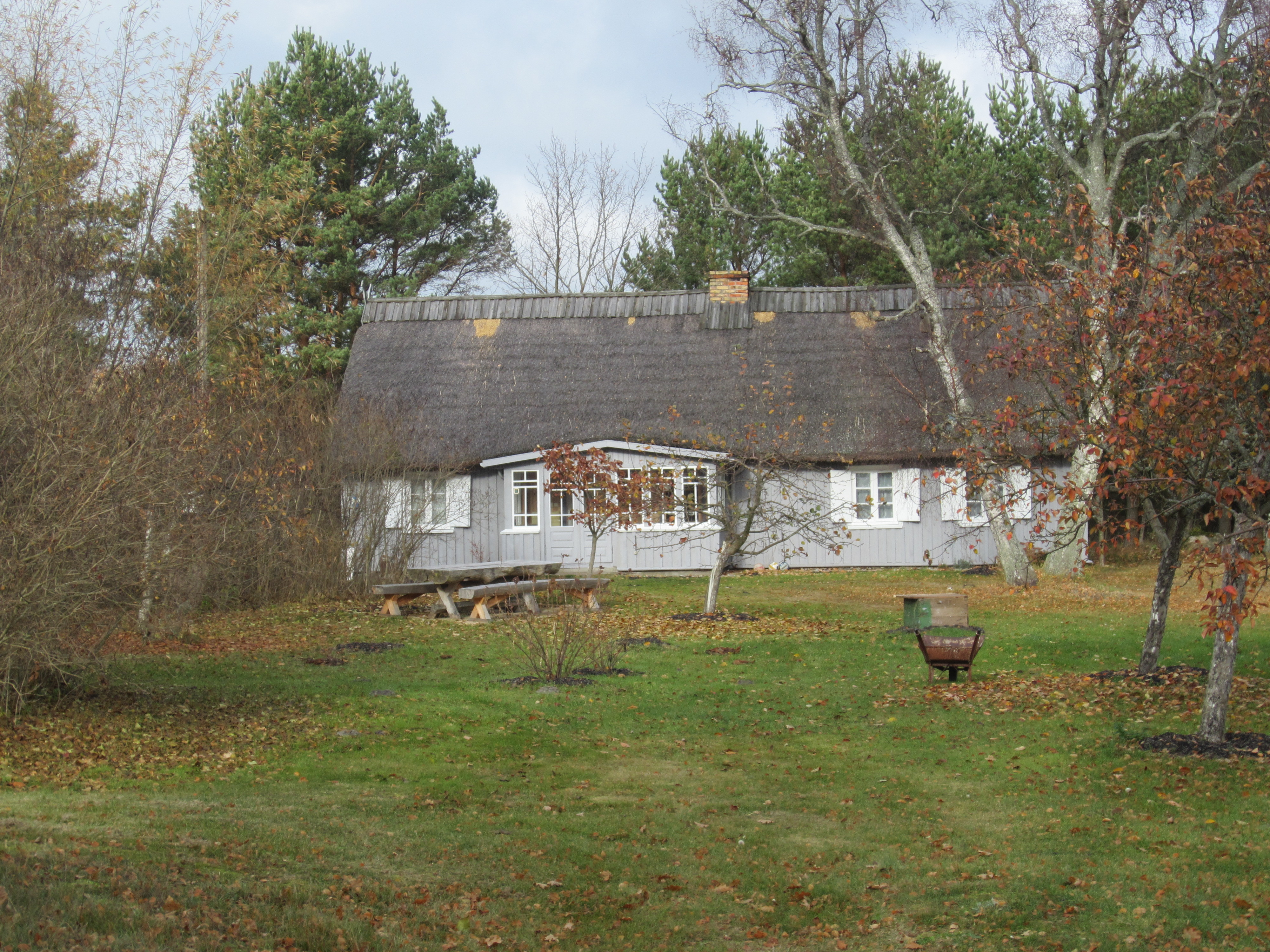 Zemnieku sēta "Agatnieki", Pape